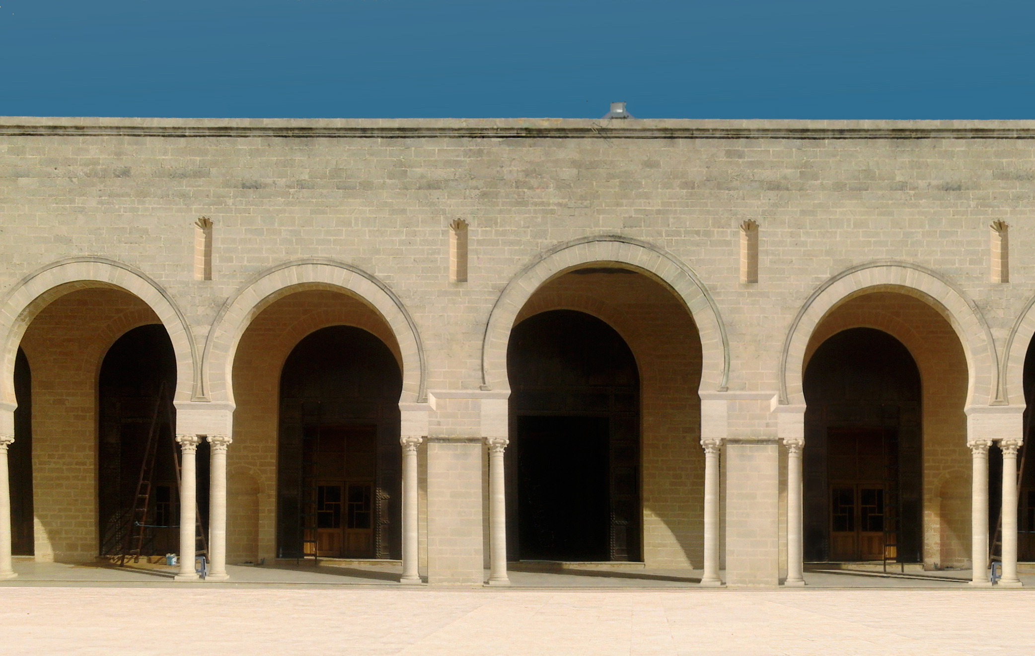 Grande Moschea di Mahdia: portico d'accesso alla Sala di Preghiera.